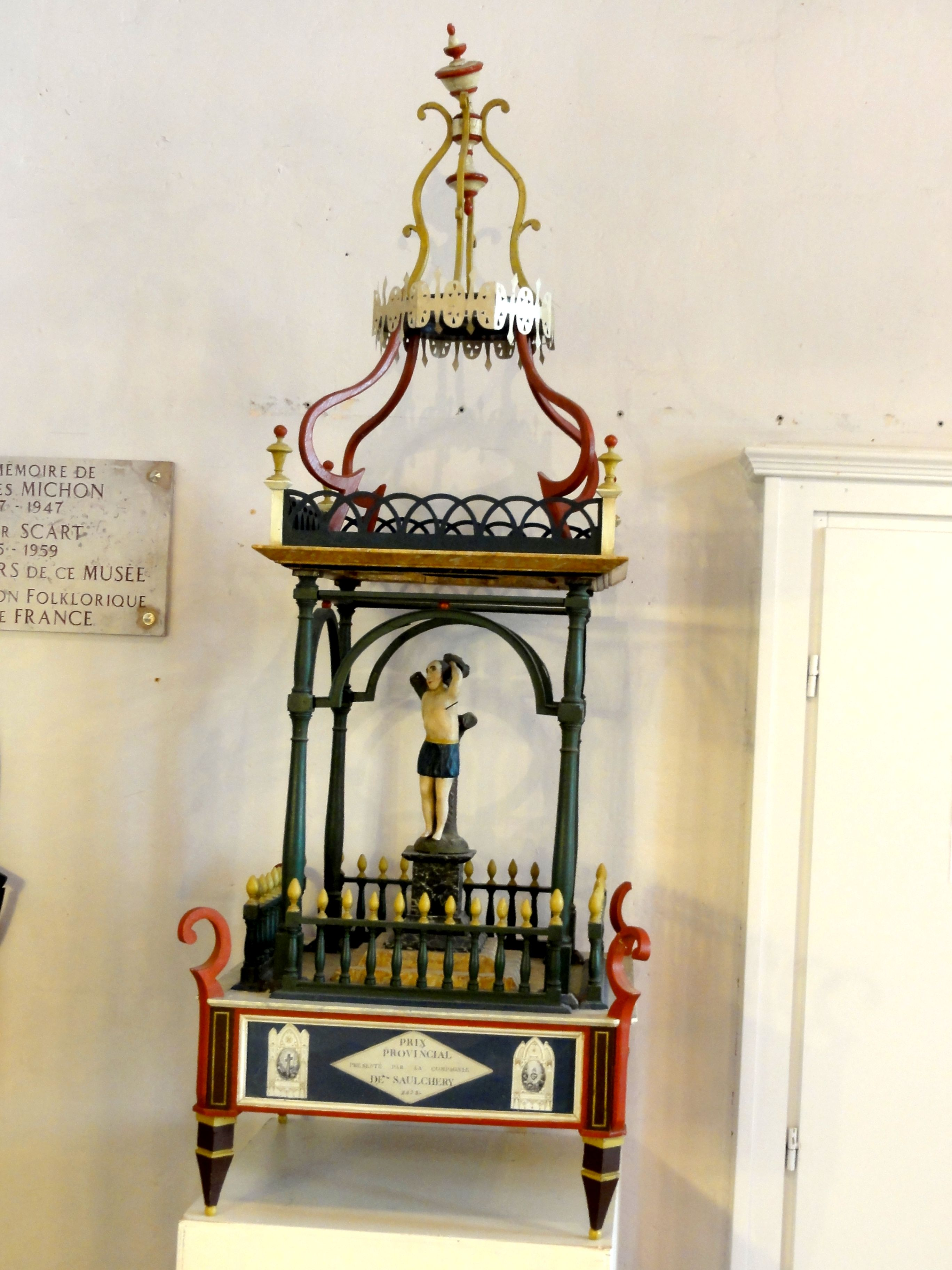 Trophée de Bouquet provincial (légénde manquante sur place).